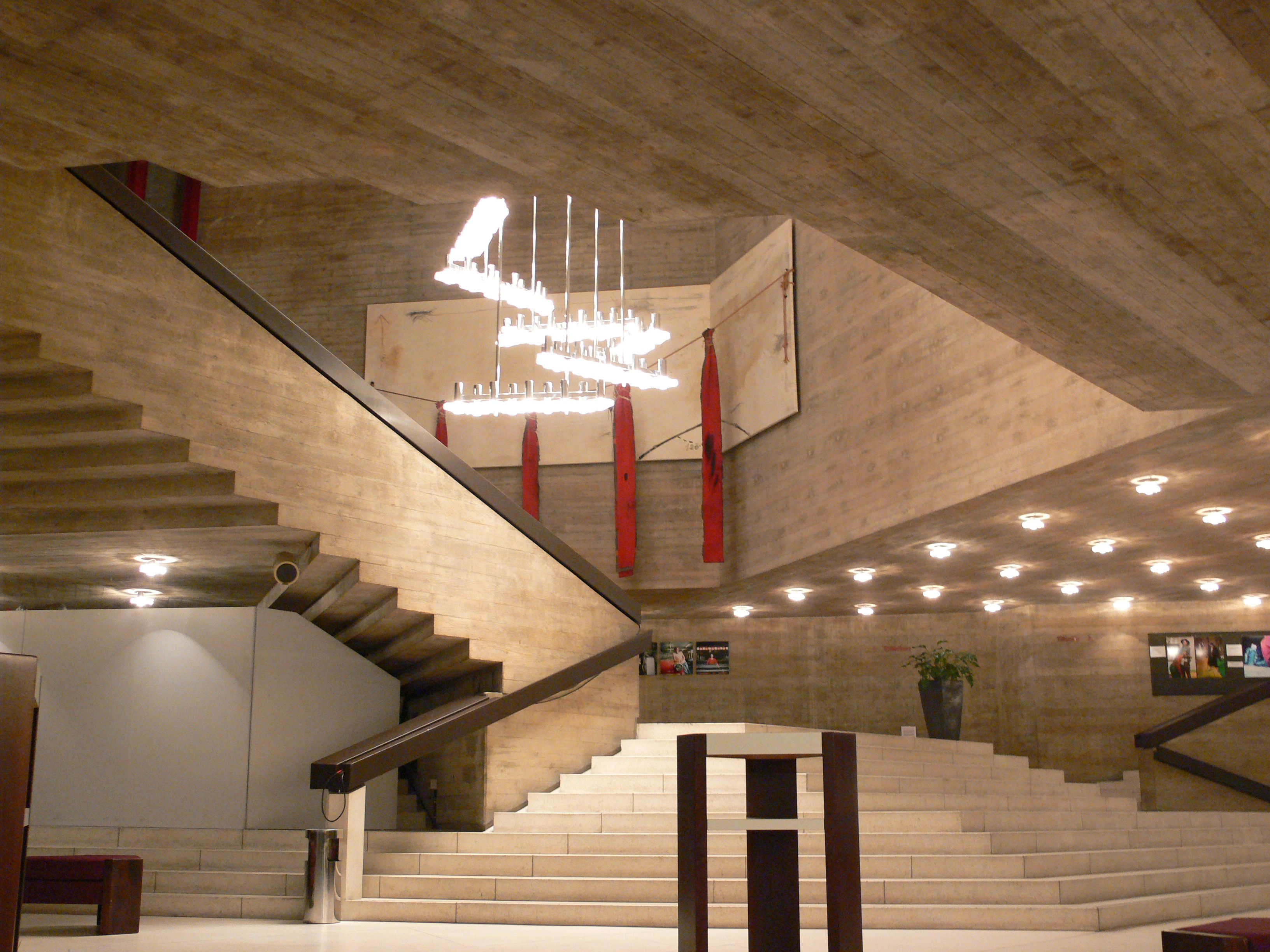 Theater St. Gallen, Treppenaufgang